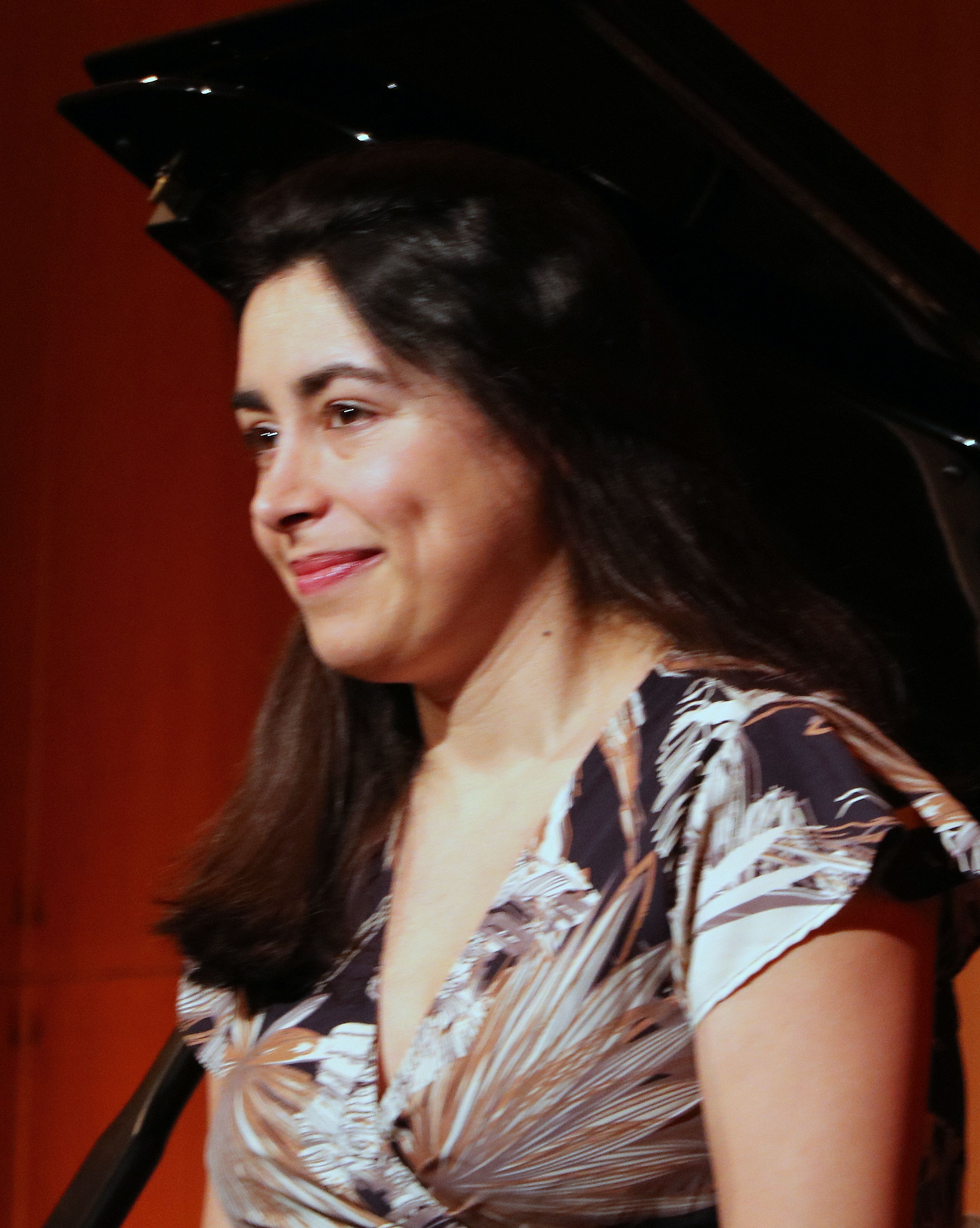 Juliana Steinbach, pianiste, La folle Journée 2018, Nantes